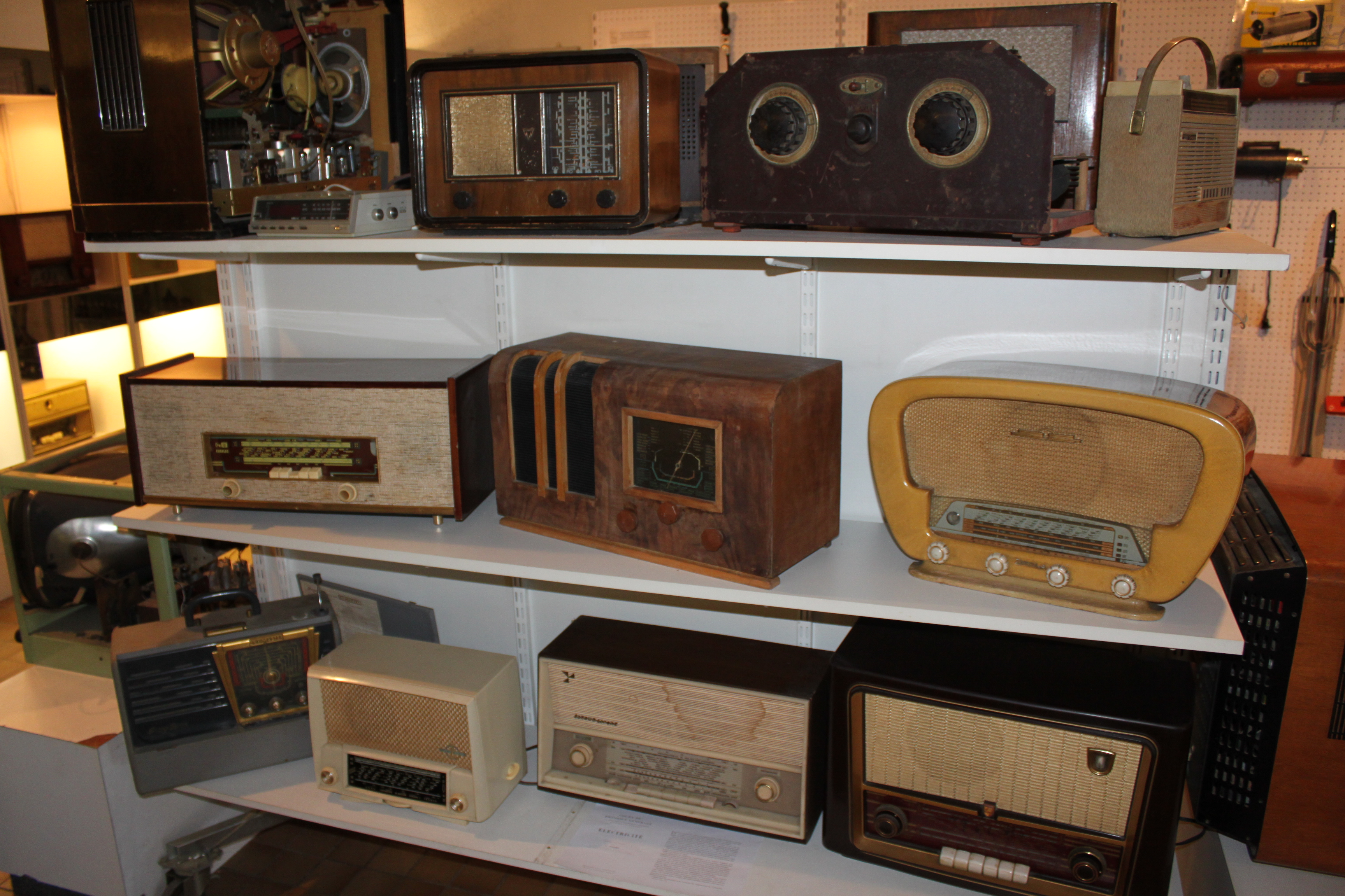 Récepteurs radio, Musée de l'électricité de Bourgogne, 42, avenue de Stalingrad, Dijon, Bourgogne, France